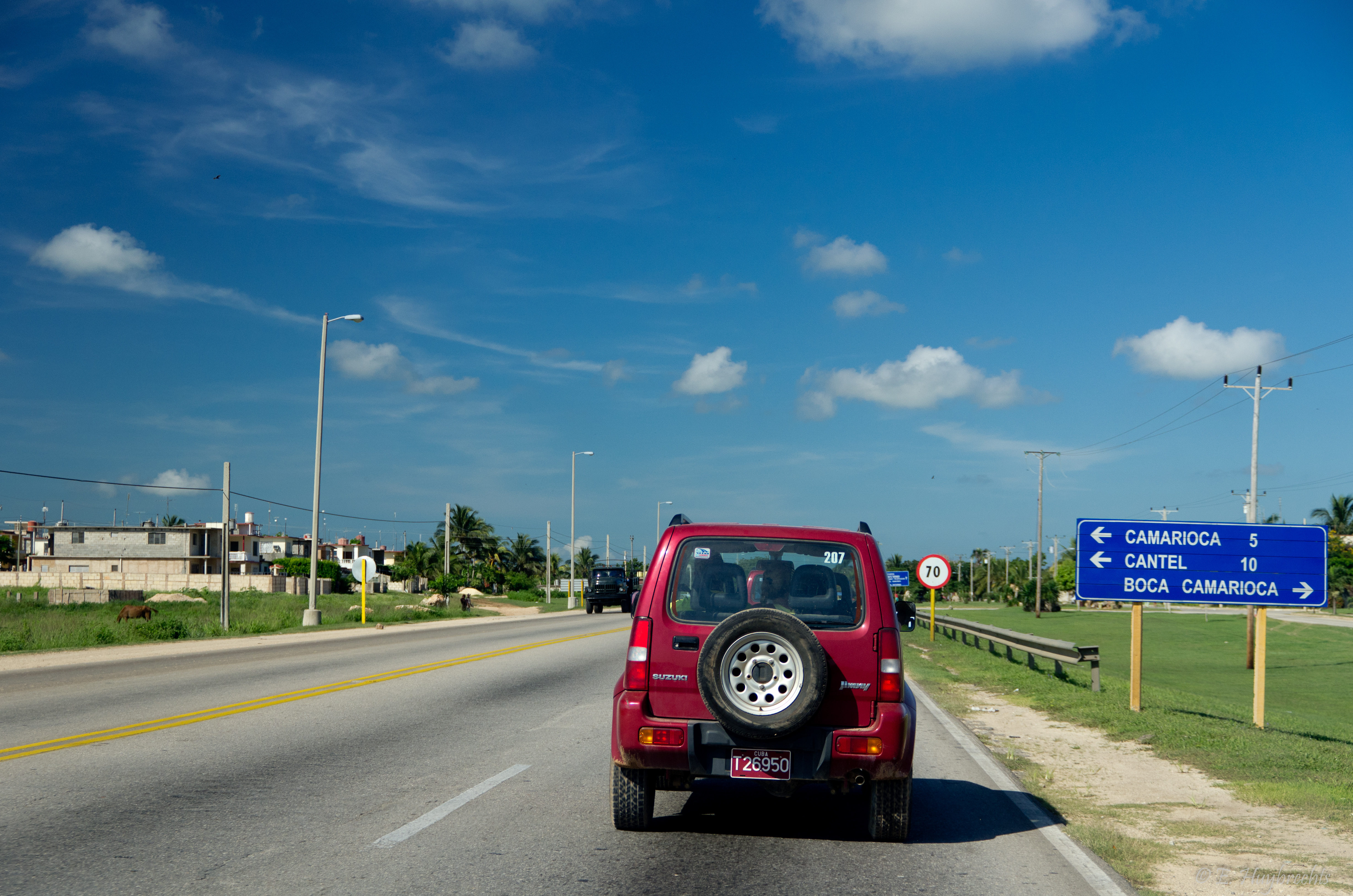 18 juillet 2011 (K5_01954)